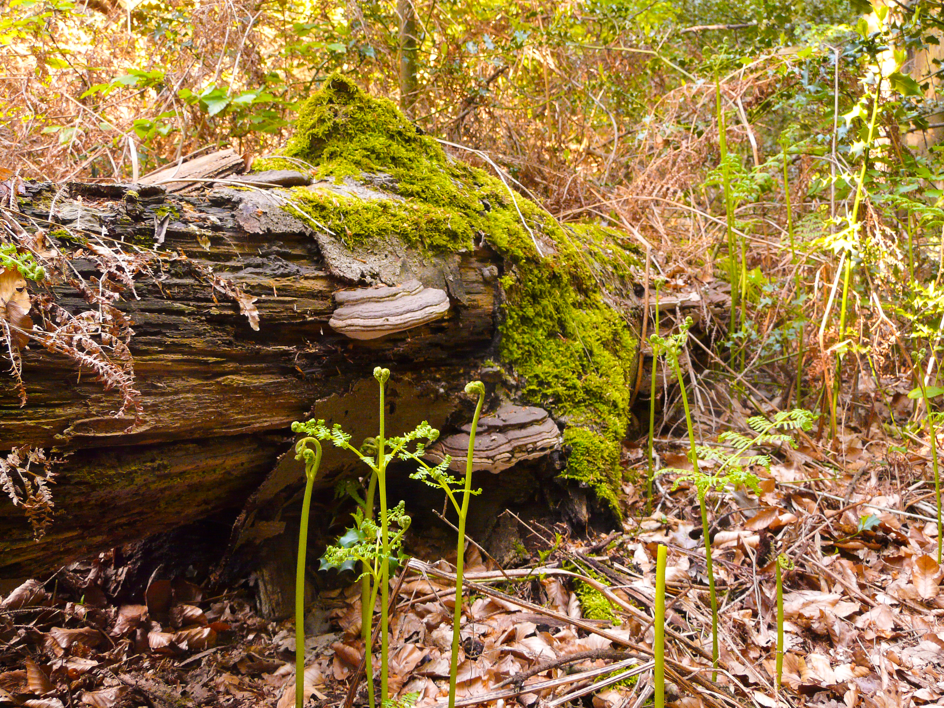 Stamm einer Rotbuche mit Zunderschwamm im Wustholz, Wuppertal-Cronenberg